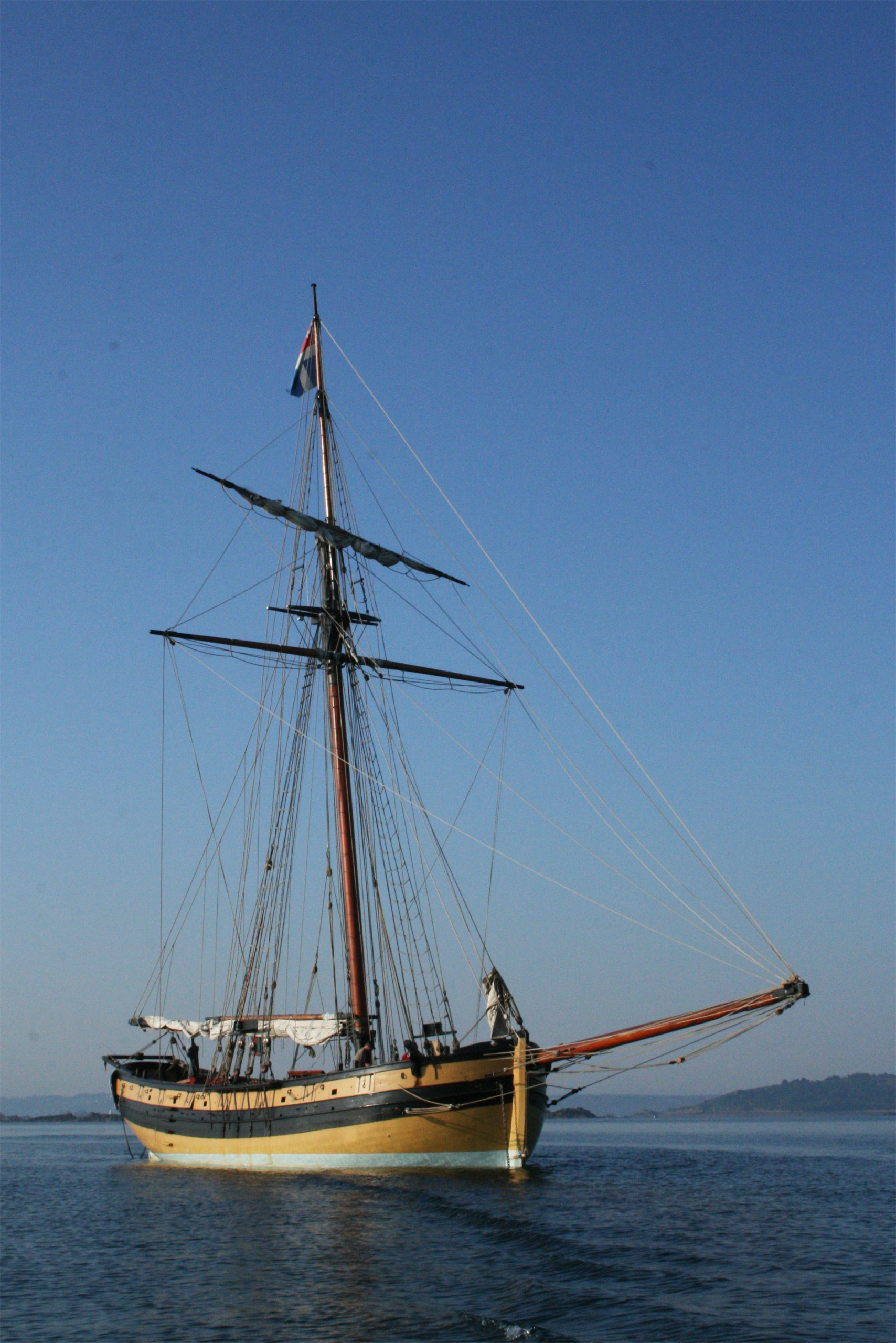 Le Renard, côtre à hunier du corsaire malouin Robert Surcouf.